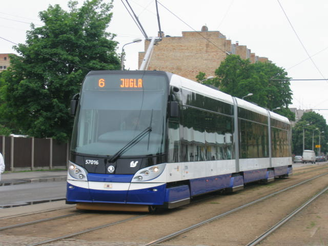 Zemās grīdas tramvajs Škoda 15T Rīgā.